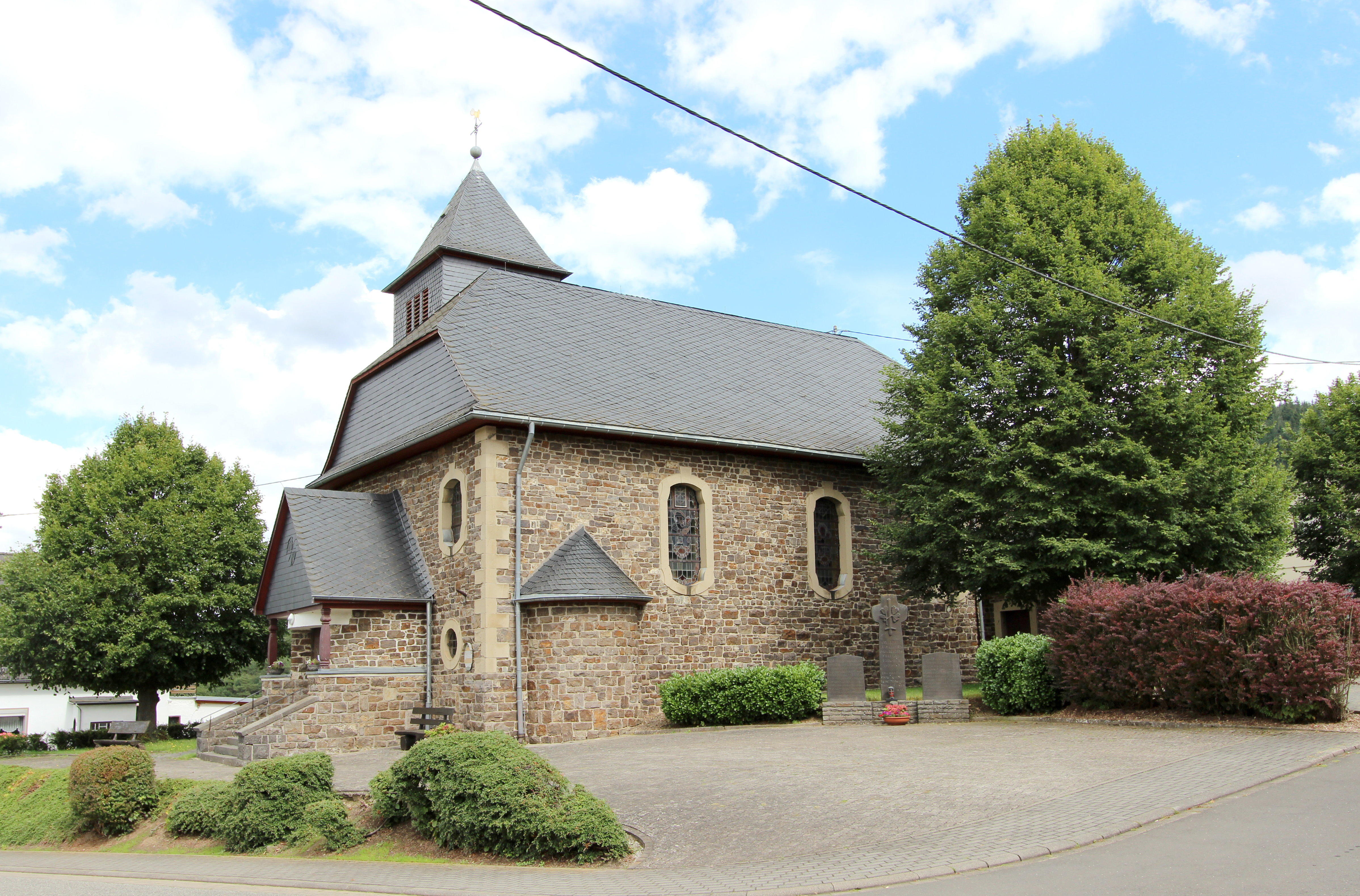 53518 Wimbach, Hauptstraße 52. Katholische Filialkirche Sankt Hubertus. Neubarocker Bruchsteinsaalbau, 1923–26. Aufnahme von 2017.